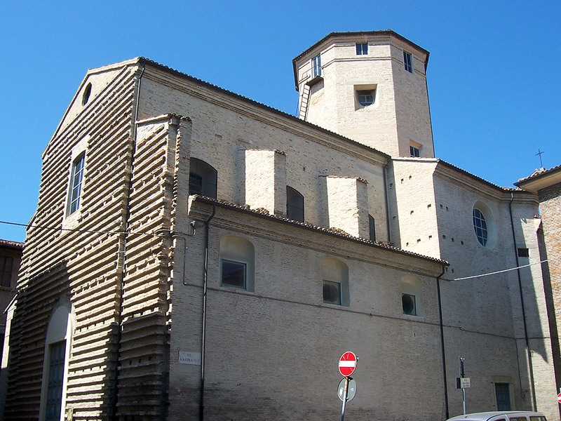 Fano - Chiesa di S. Pietro ad Vallum